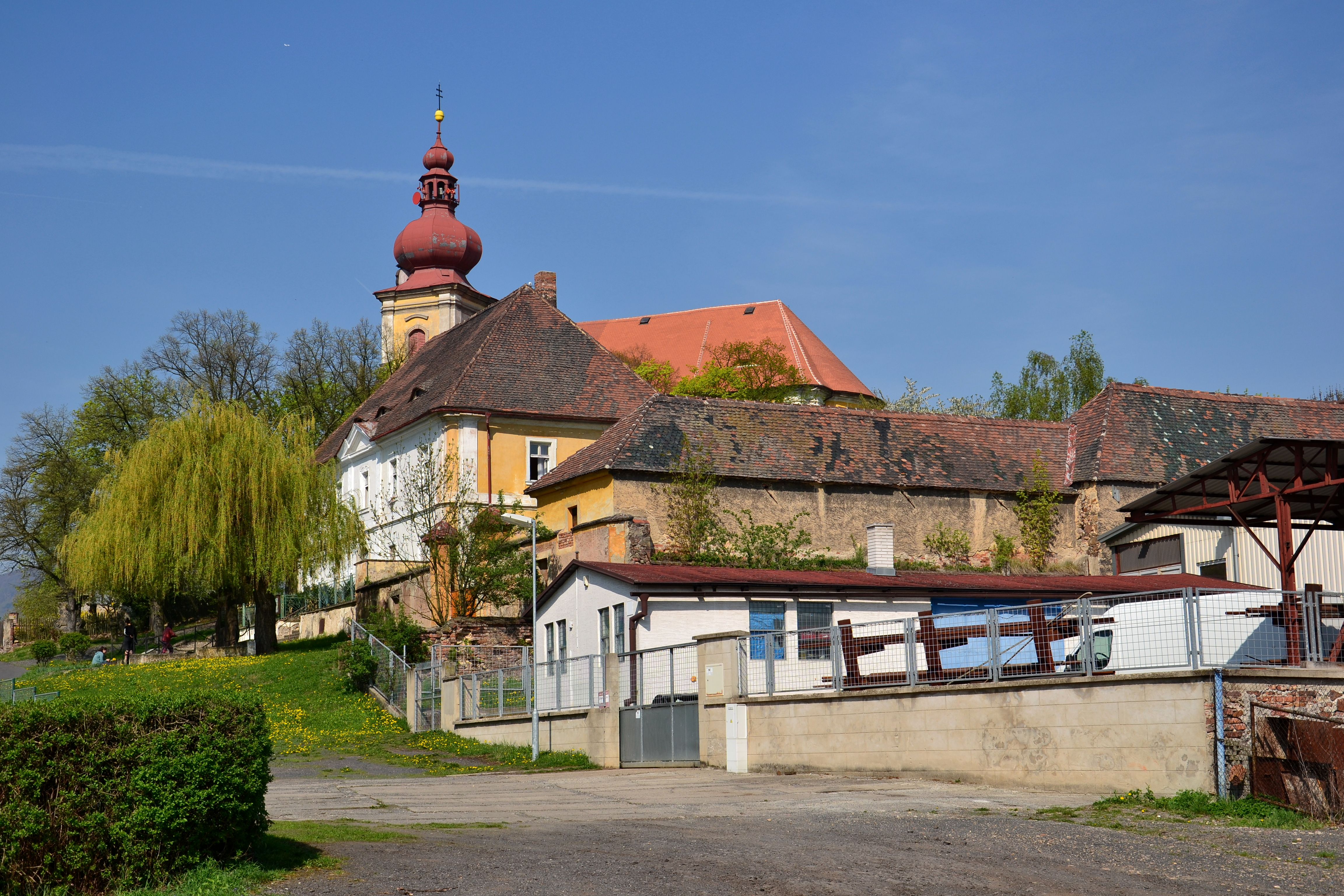 Střed vesnice s kostelem svatých Petra a Pavla